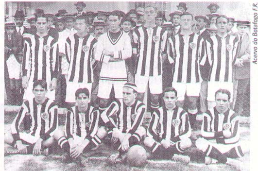 Time do Botafogo em 1913.